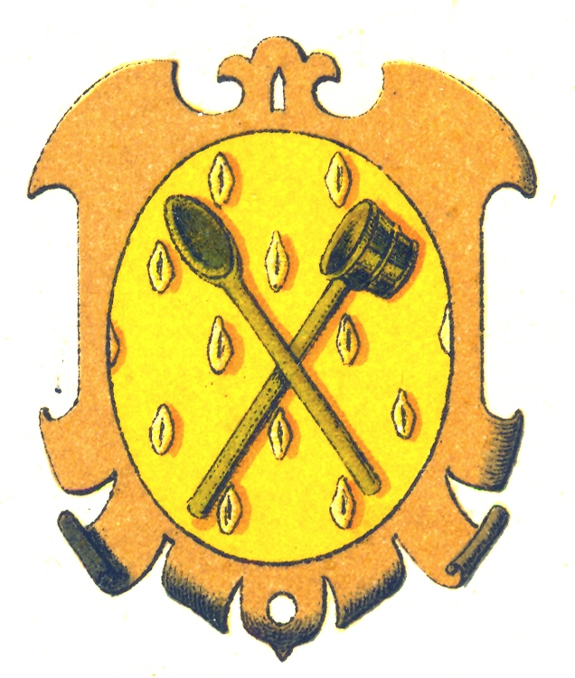 Zunftwappen Brauer